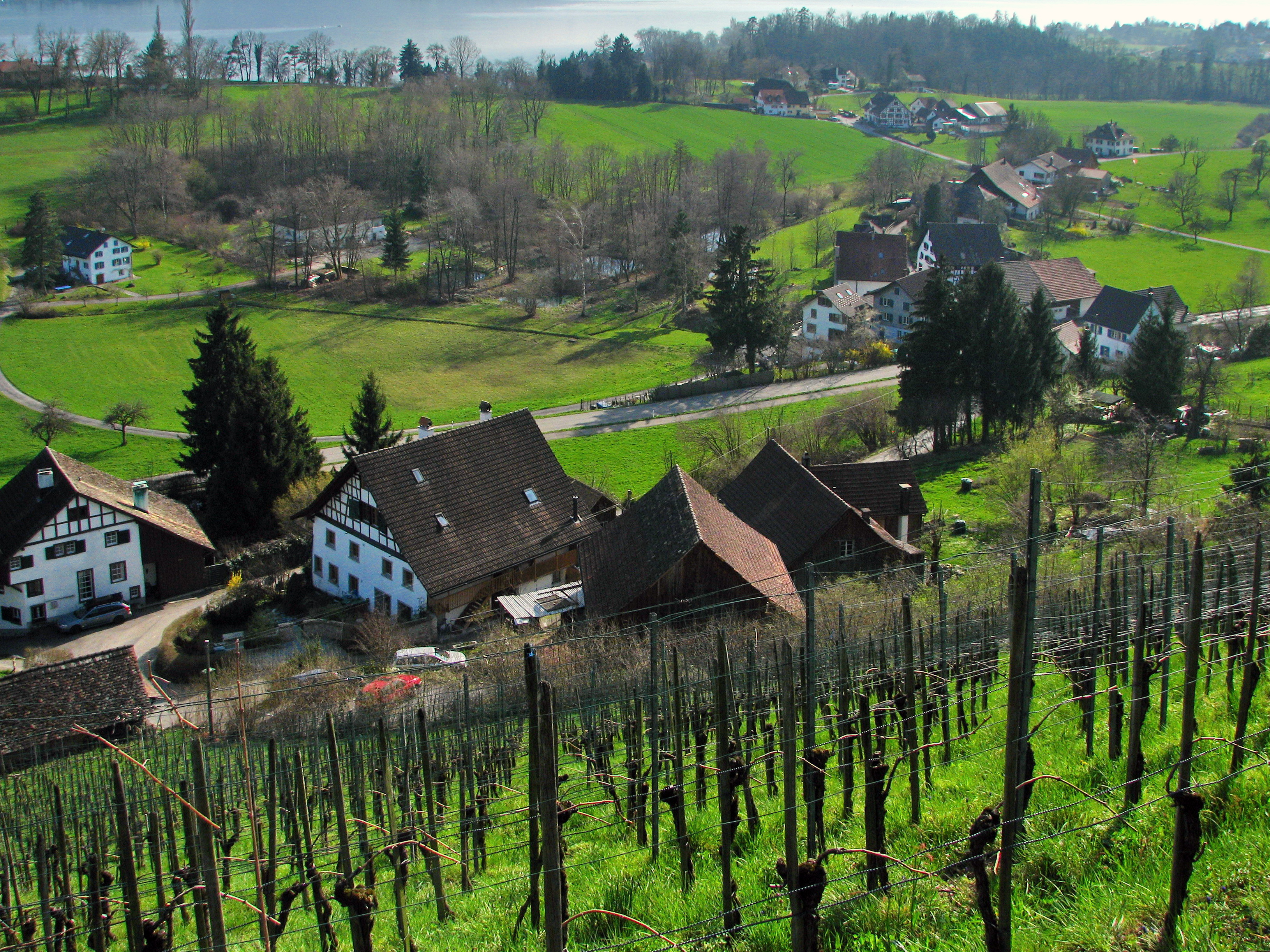 Schlatt in Hombrechtikon (Switzerland)